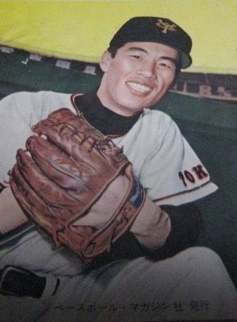 週刊ベースボール1959年1月28日号より